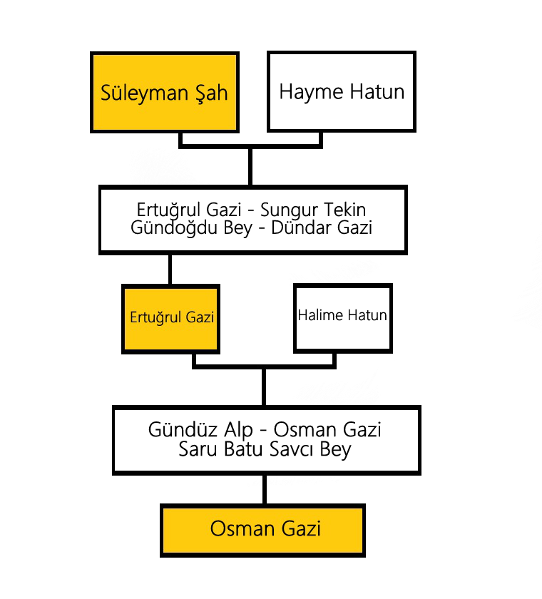 Süleyman Şah'ın Osman Gazi'nin hükümdarlığına dek süren soy ağacı.